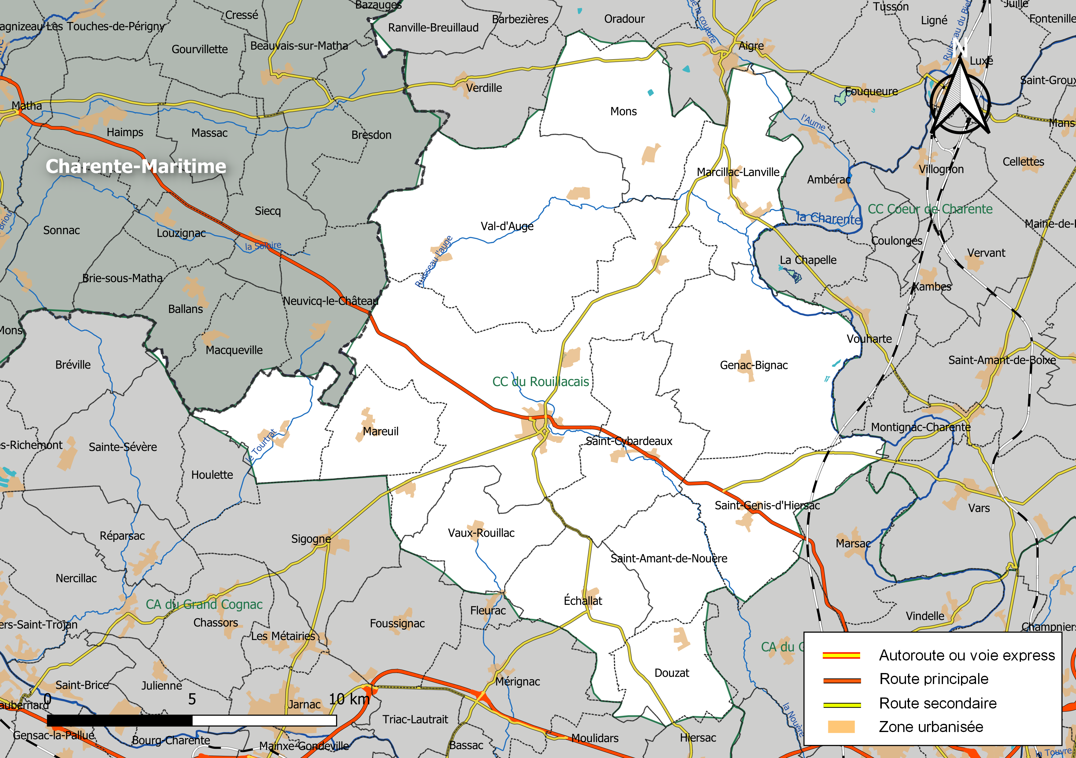 Carte géographique de la Communauté de communes du Rouillacais, département de la Charente, France. Composition au 1er janvier 2019.